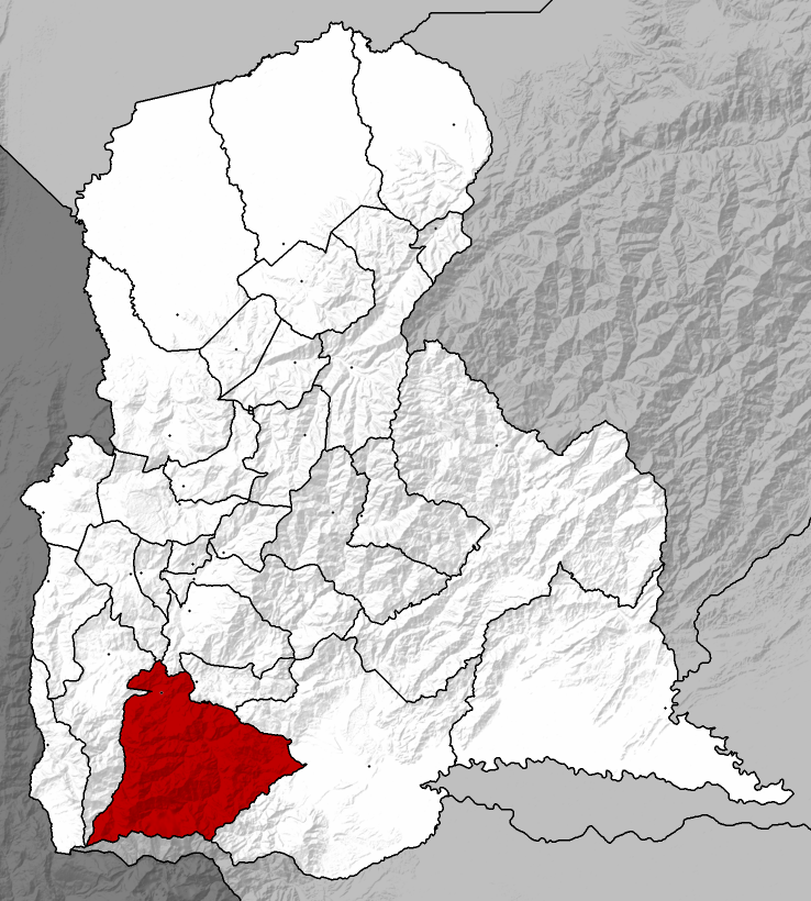 Municipio Córdoba - Táchira